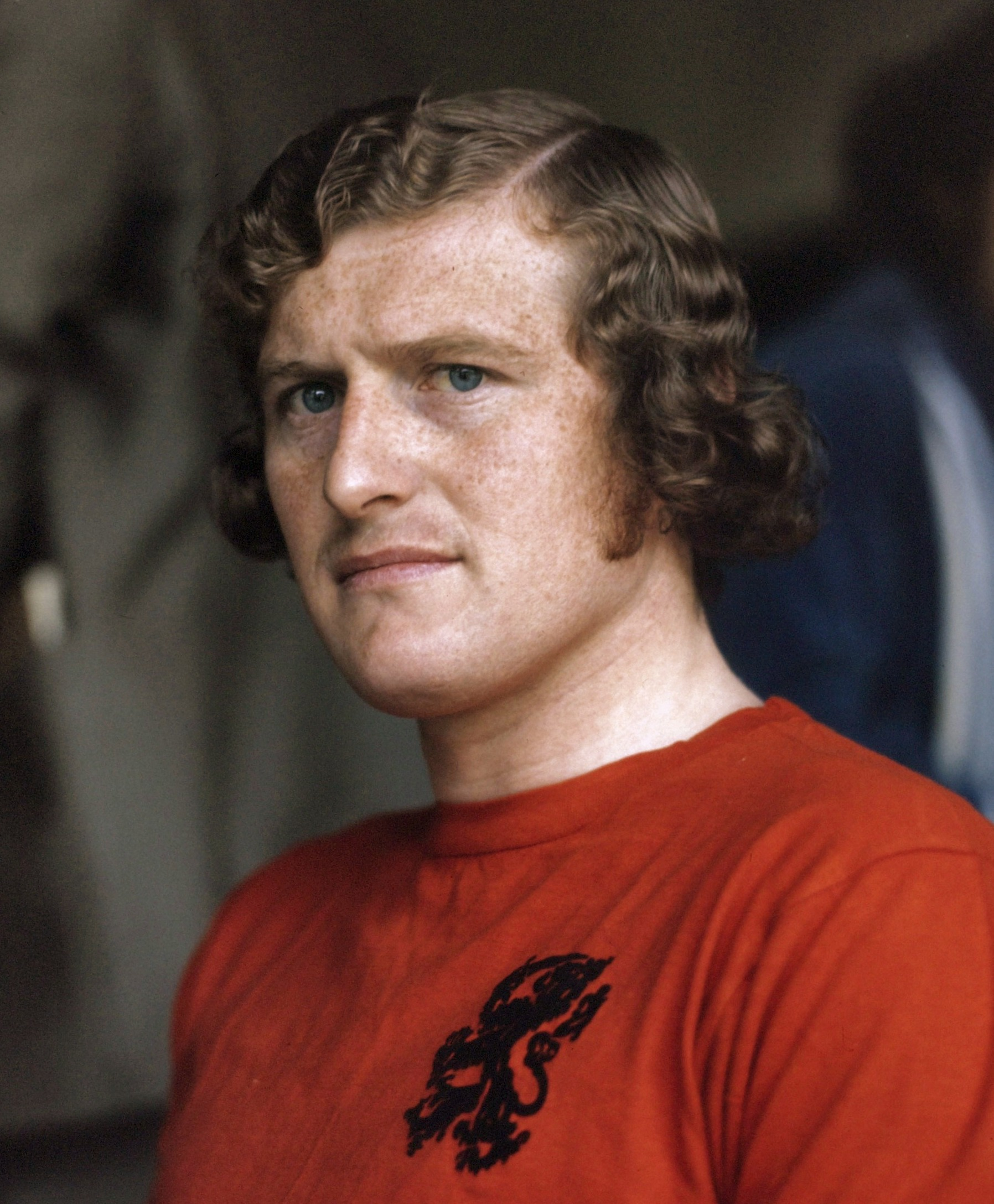 Wim Jansen (footballer)